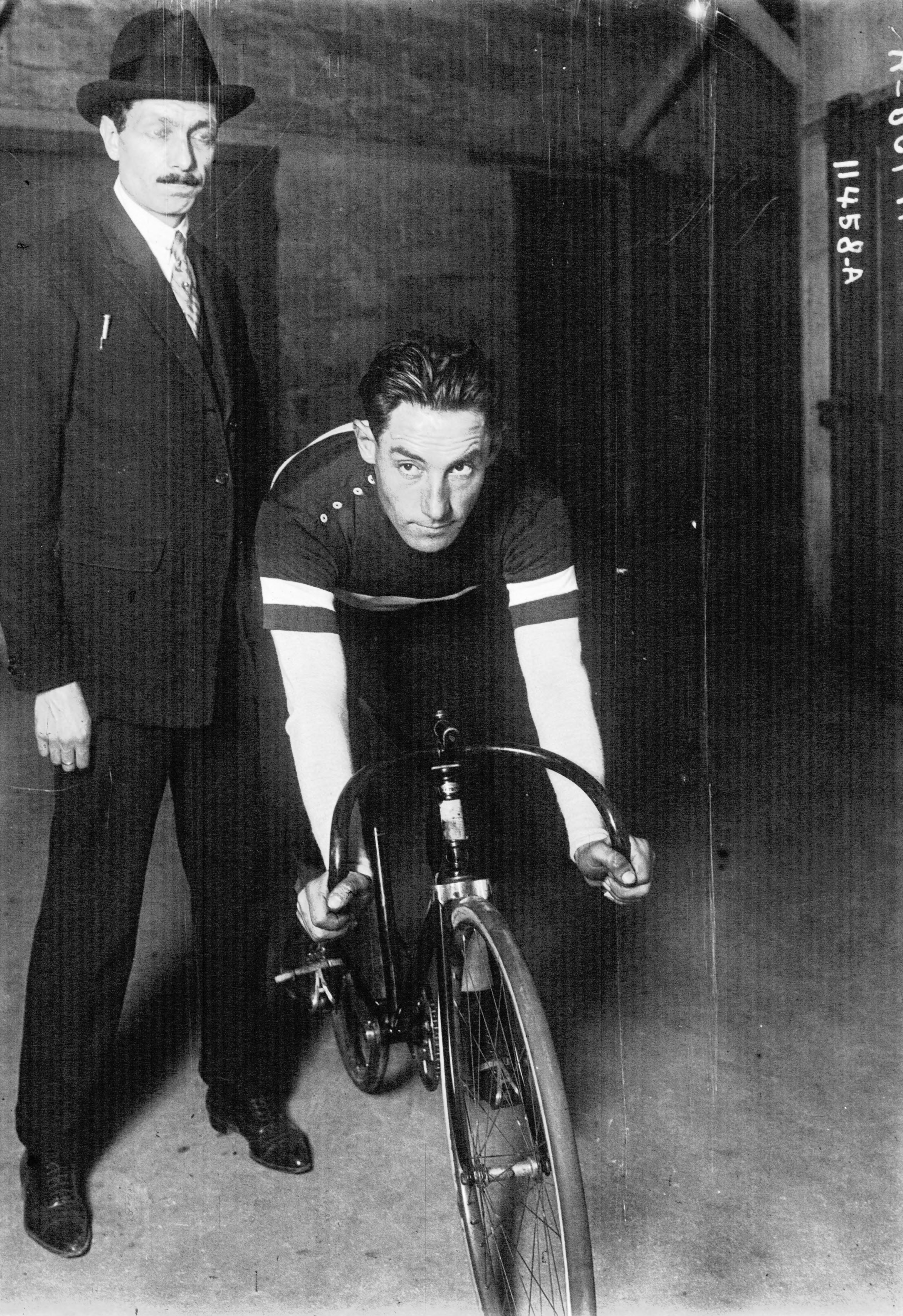 Vel'd'Hiv': Girardengo, vainqueur, en vélo (portrait à 2 m).